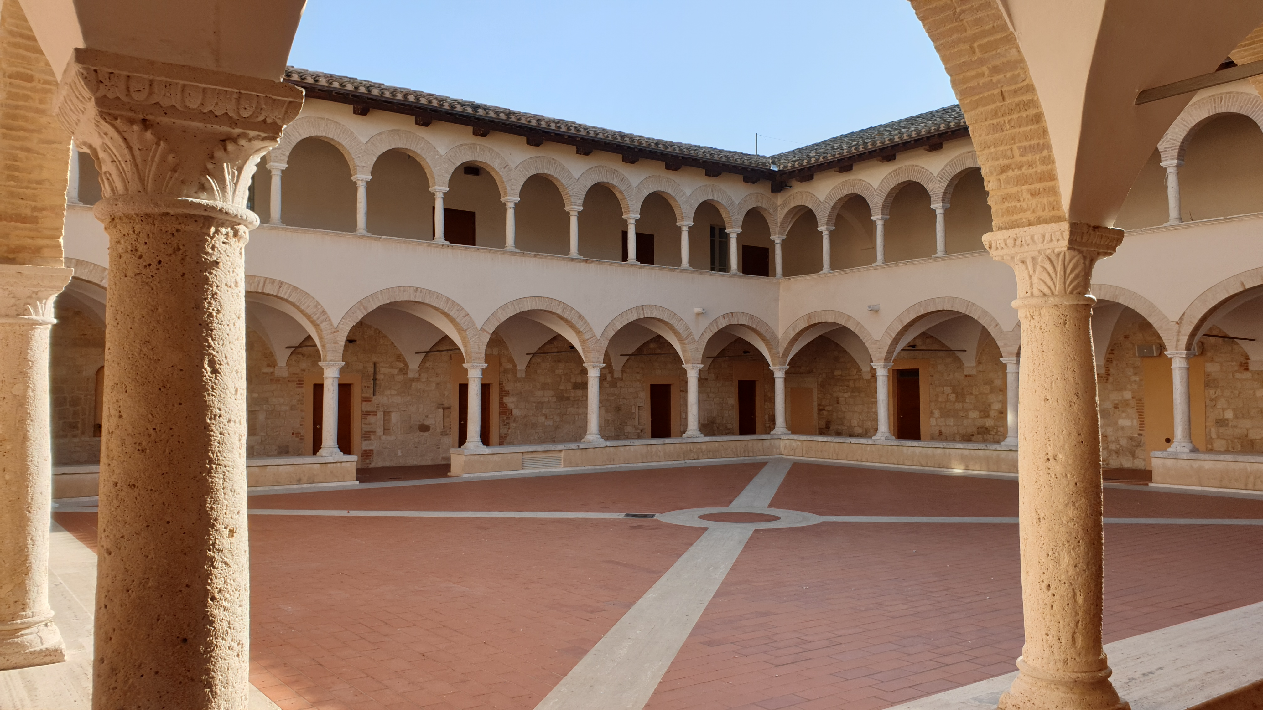 Ascoli Piceno: Chiesa dei Santi Pietro e Paolo